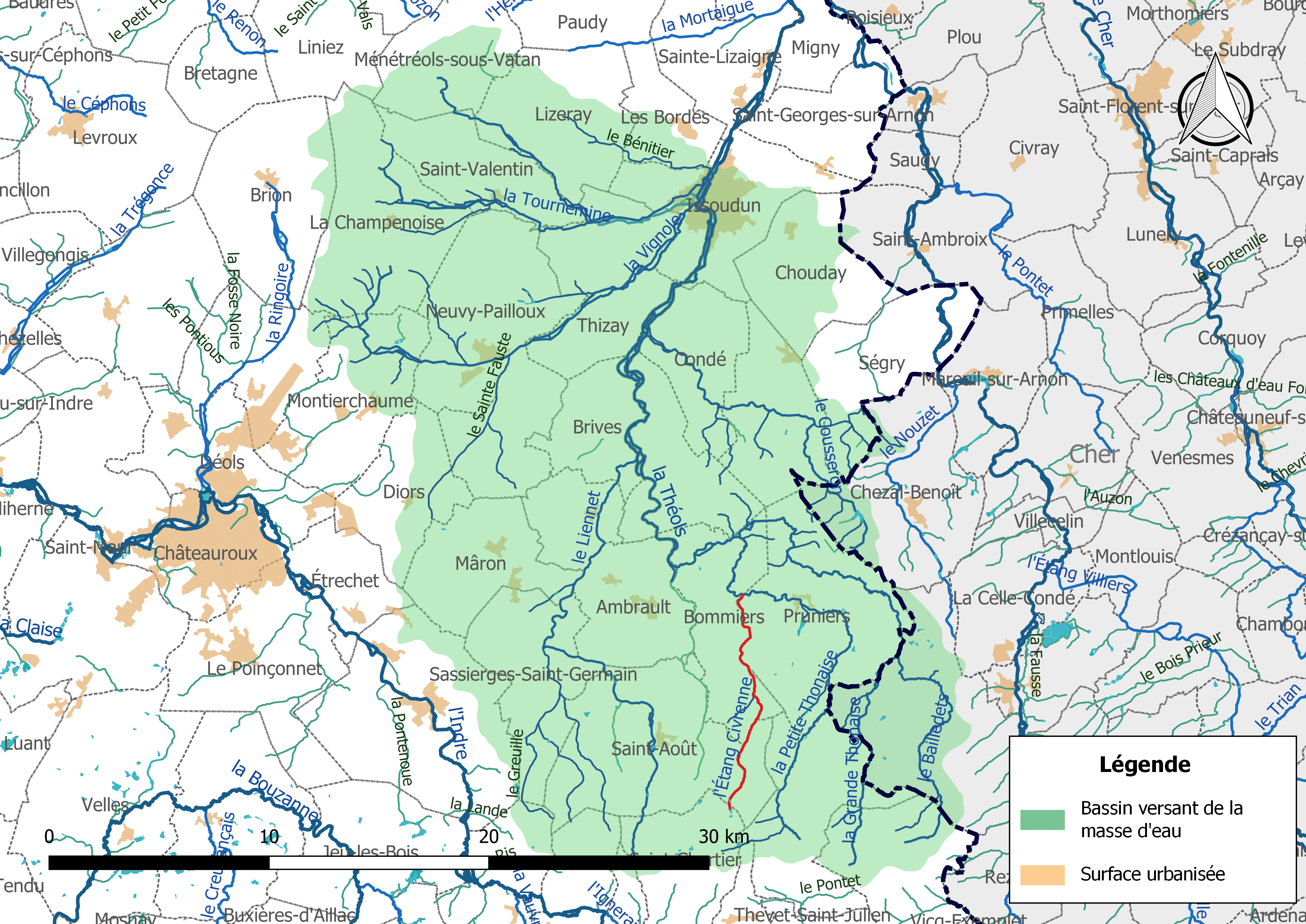 Carte de la masse d'eau « FRGR0340a », avec mise en exergue du cours d'eau « l'Etang Civrenne » (en rouge).